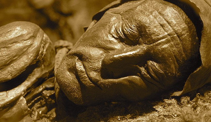 Hlava